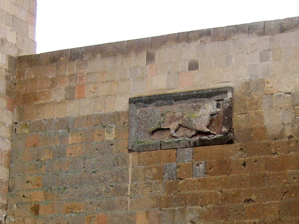 Ani sehir surlarinda bir kabartma